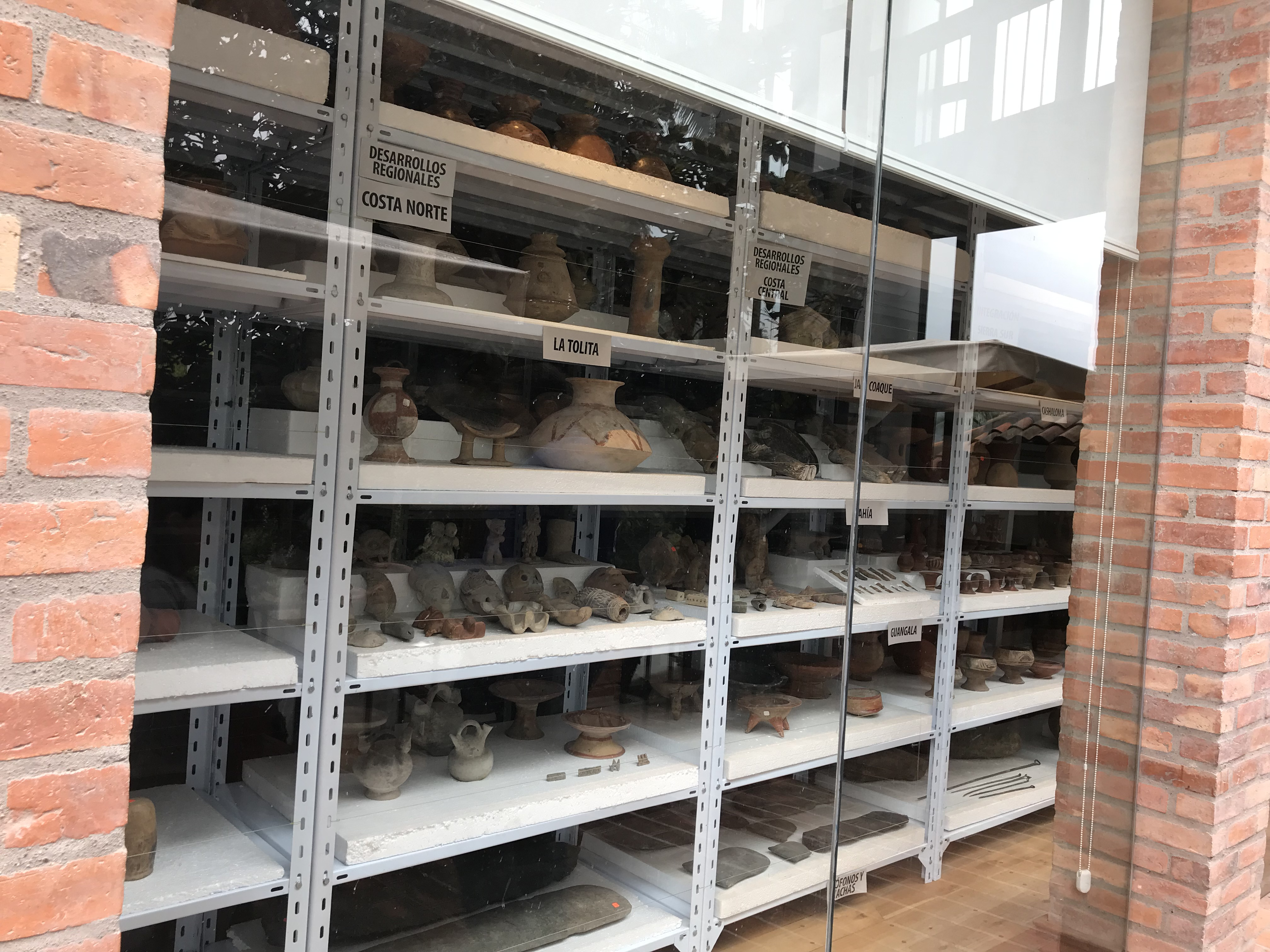 Casa Museo Remigio Crespo Toral - colección de piezas de arqueología